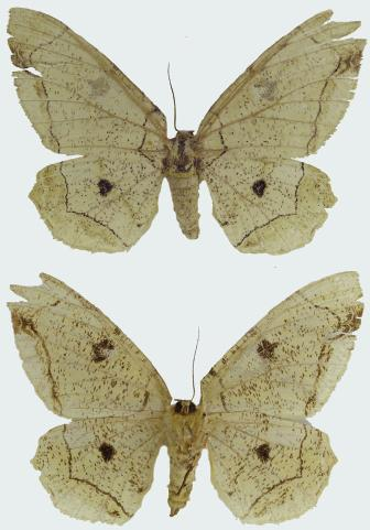 Biston bengaliaria